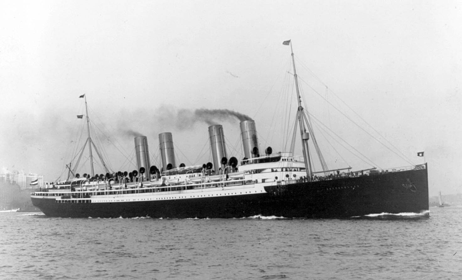 SS Deutschland